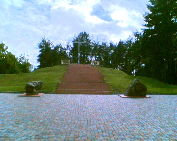 Autor:Kamil Ubowski